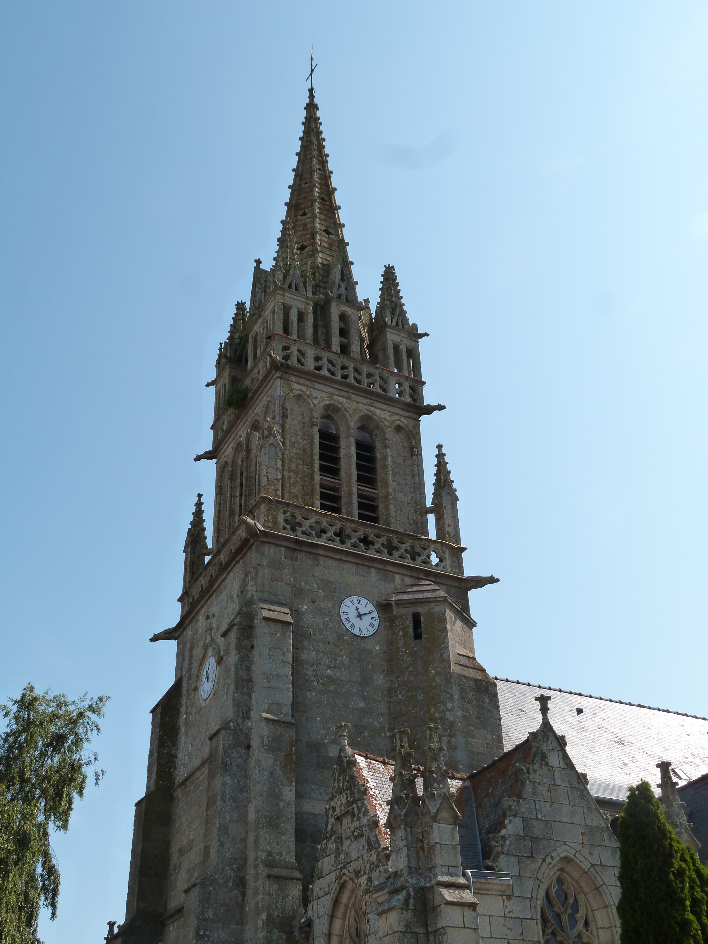 Clocher de l'église Saint-Pierre de Quemper-Guézennec (Côtes-d'Armor)